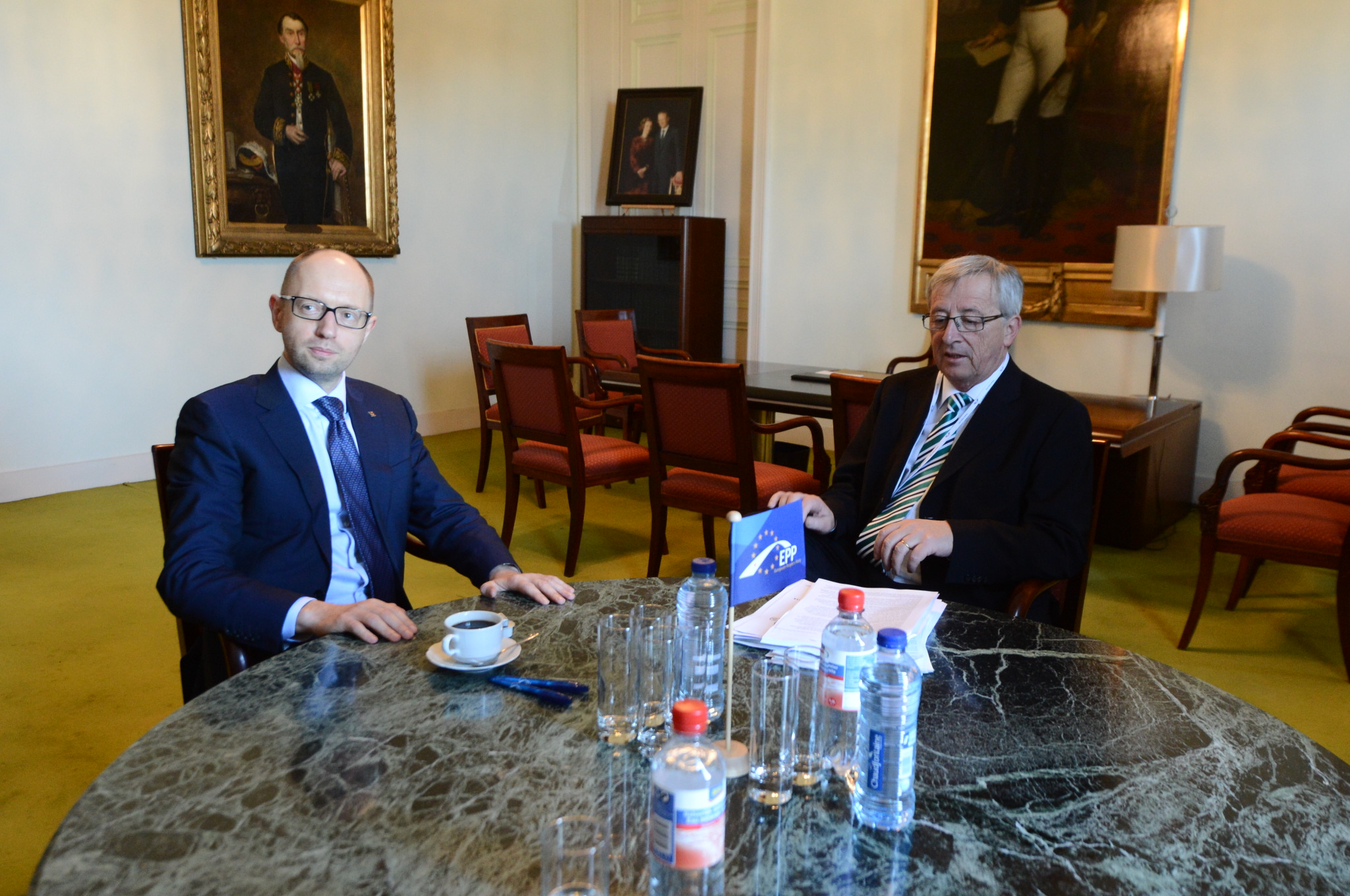 EPP Brussels Summit; Mar. 2014